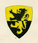 Stemma della famiglia Nori